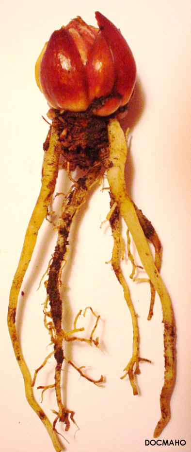 Lilium primulinum bulb